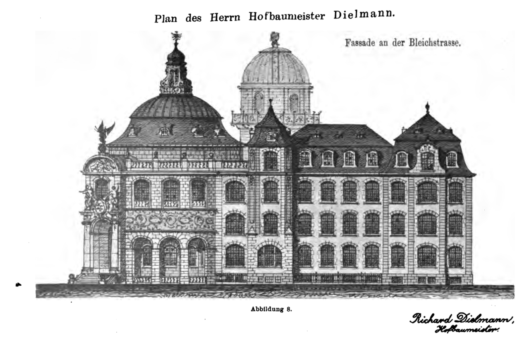 Zeichnung des Gebäudes des Physikalischen Vereins von Richard Dielmann, Ecke Bleichstraße/Brönnerstraße, wurde nie umgesetzt, da der Physikalische Verein ein anderes Grundstück zur Verfügung gestellt bekam.